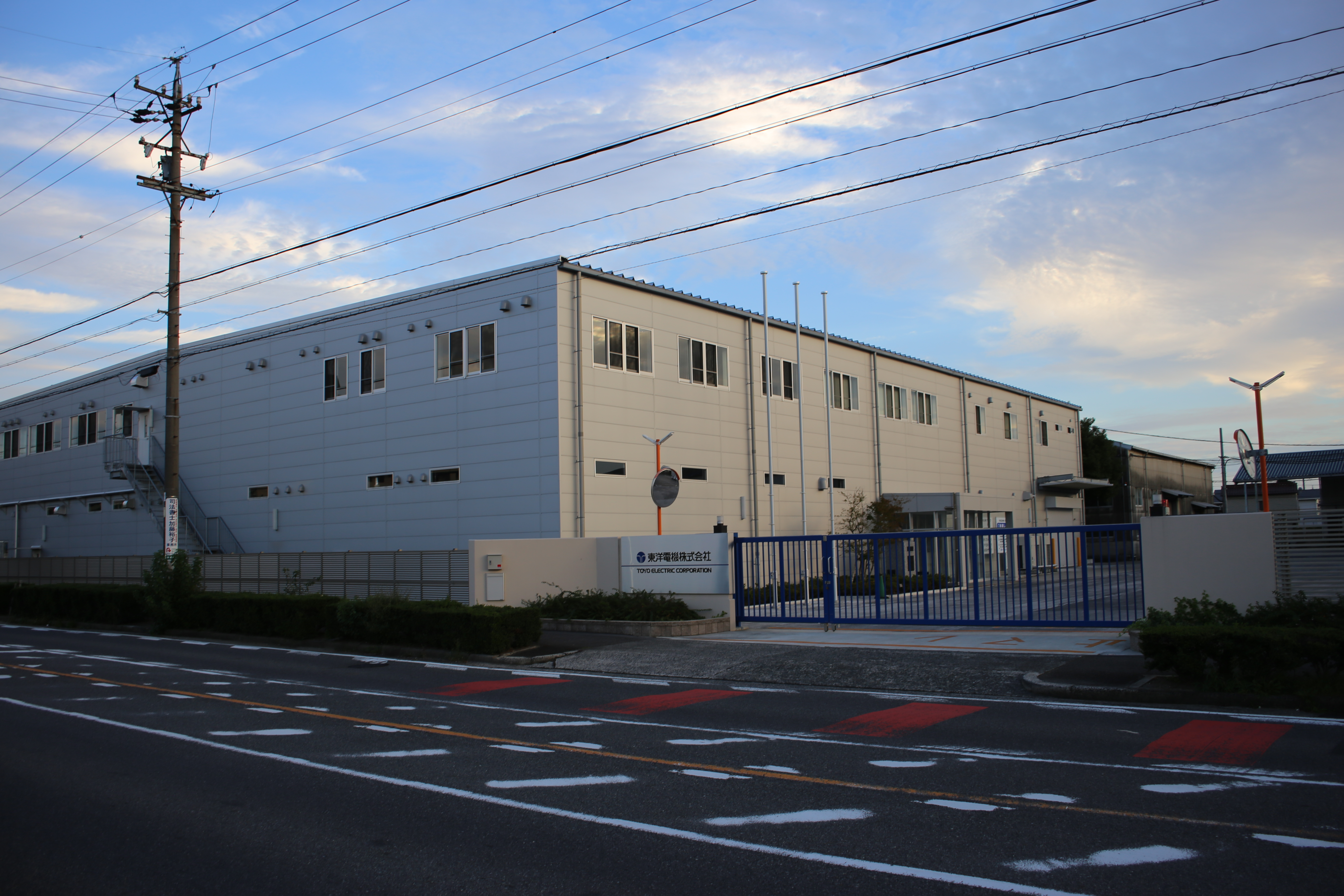 愛知県春日井市の東洋電機本社